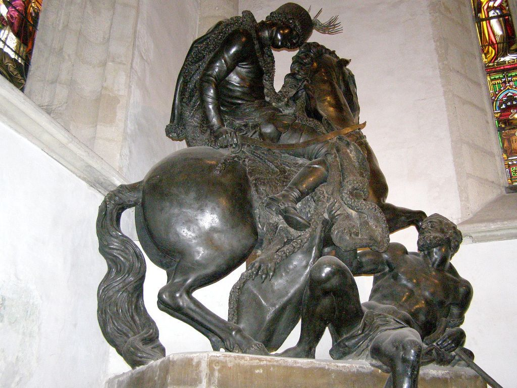 Jazdecké súsošie Svätý Martin so žobrákom v Katedrále sv. Martina v Bratislave z roku 1734, dielo G. R. Donnera